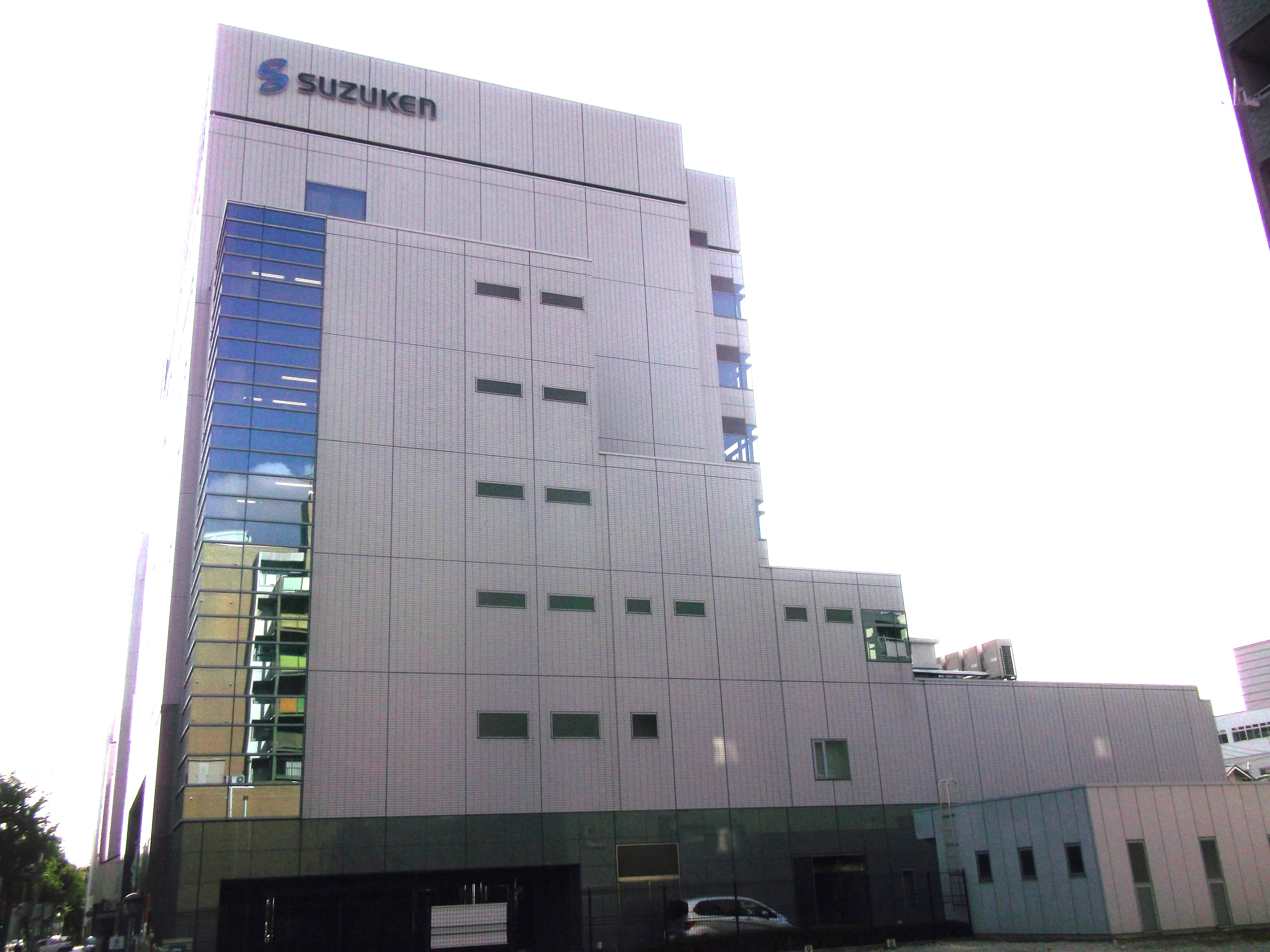 名古屋市東区東片端町のスズケン本社を南側公道東側より撮影